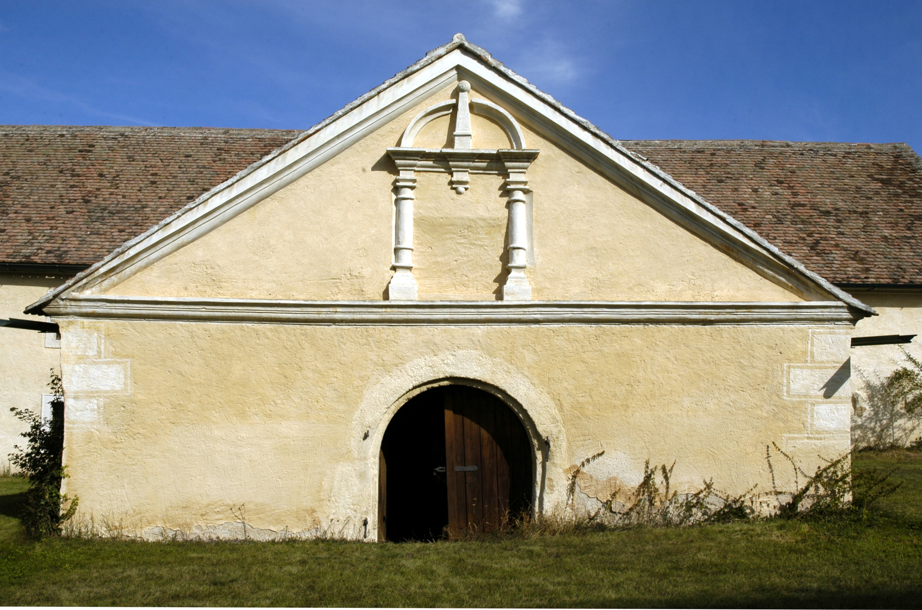 Schrattenthal - Schloss, Portal des Schafstalles Dieses Bild wurde anlässlich des österreichischen Tags des Denkmals 2012 in Niederösterreich eingereicht.